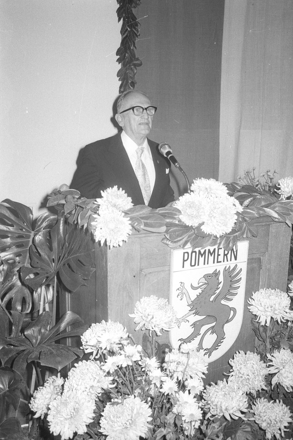 Der Kulturpreis geht an Prof. Dr. Dr. h.c. Johannes Paul und Prof. Bruno Müller-Linow. Der Hamburger Historiker Paul spricht als Preisträger.